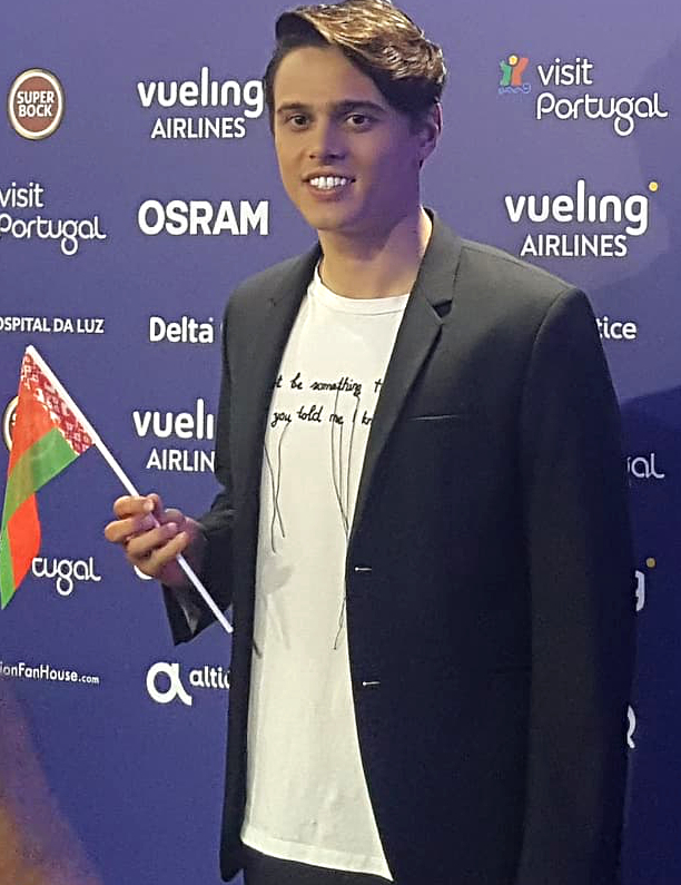 Ukraiński piosenkarz Alekseev, maj 2018